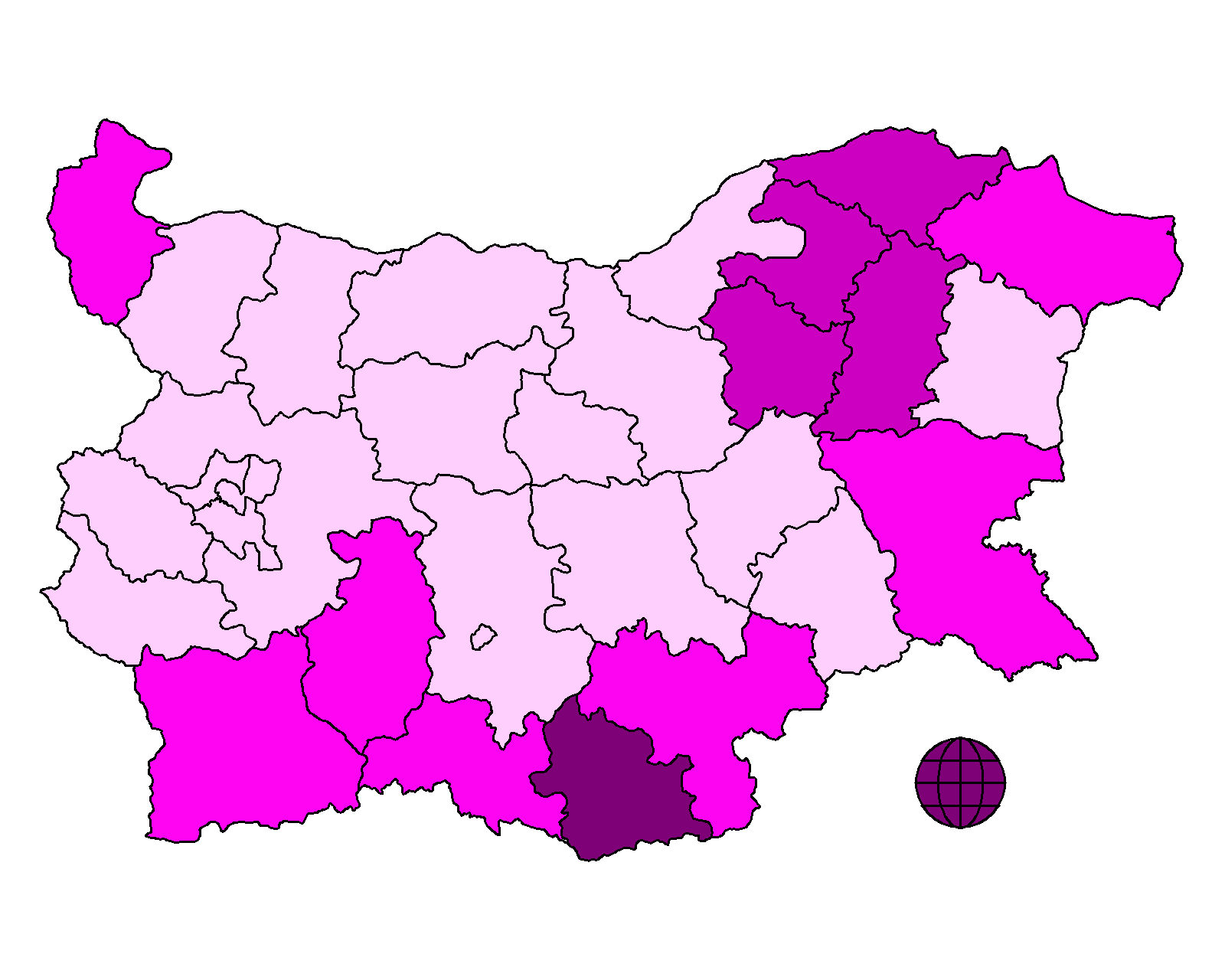 Гласуване по райони за Движение за права и свободи на парламентарните избори през 2005. Всеки от цветовете съответства на приблизително 1/4 от подадените гласове По тъмният цвят съответства на получен по-голям процент от гласовете